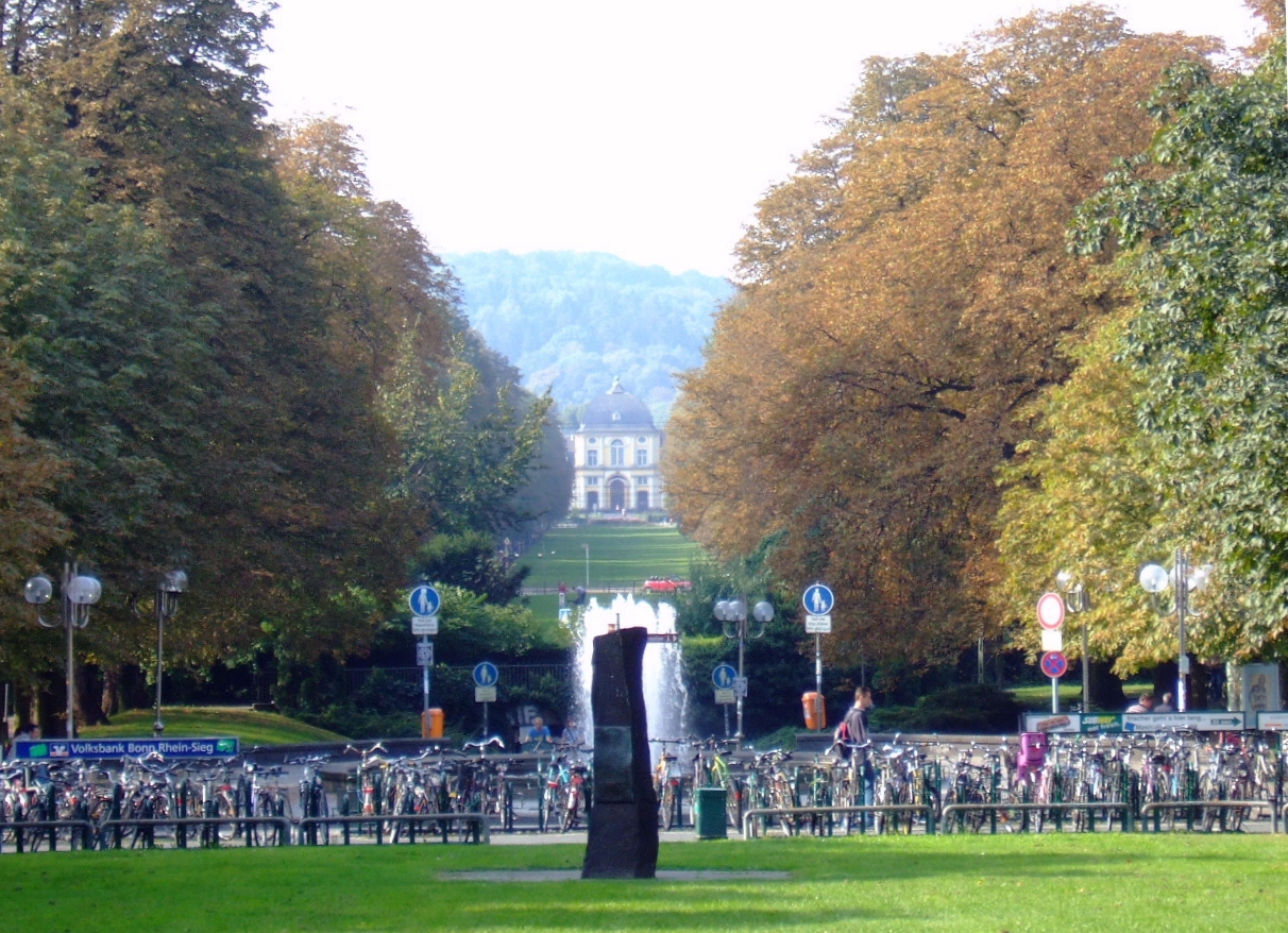 Bonn – Poppelsdorfer Allee – im Vordergrund der Kaiserplatz mit dem „Mahnmal für die Bonner Opfer des Nationalsozialismus“ - dahinter der Kaiserbrunnen und im Hintergrund das Poppelsdorfer Schloss und der Venusberg